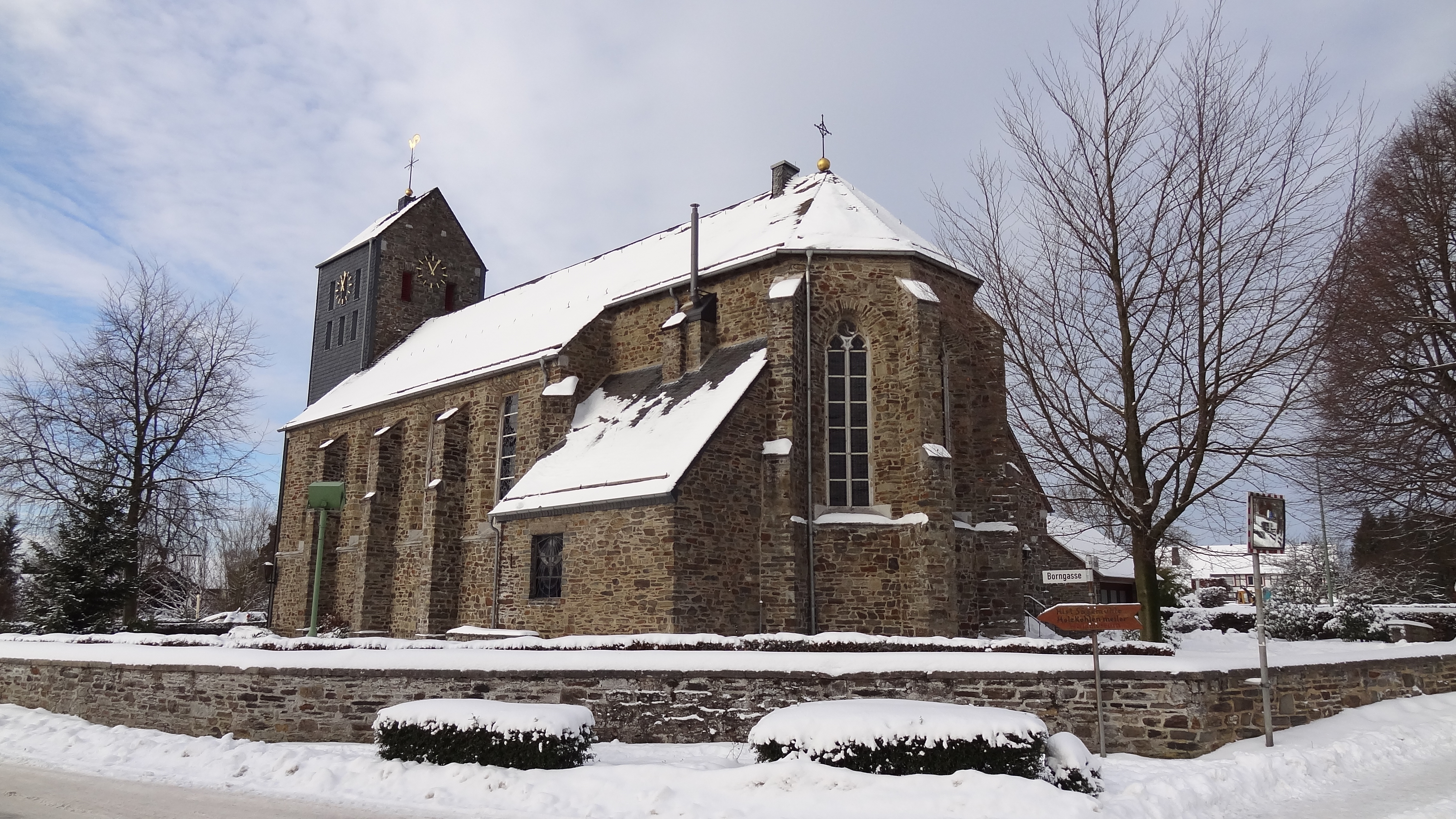 Rohren, 52156 Monschau, Germany